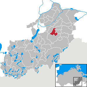 Cölpin in Mecklenburg-Vorpommern, Landkreis Mecklenburg-Strelitz